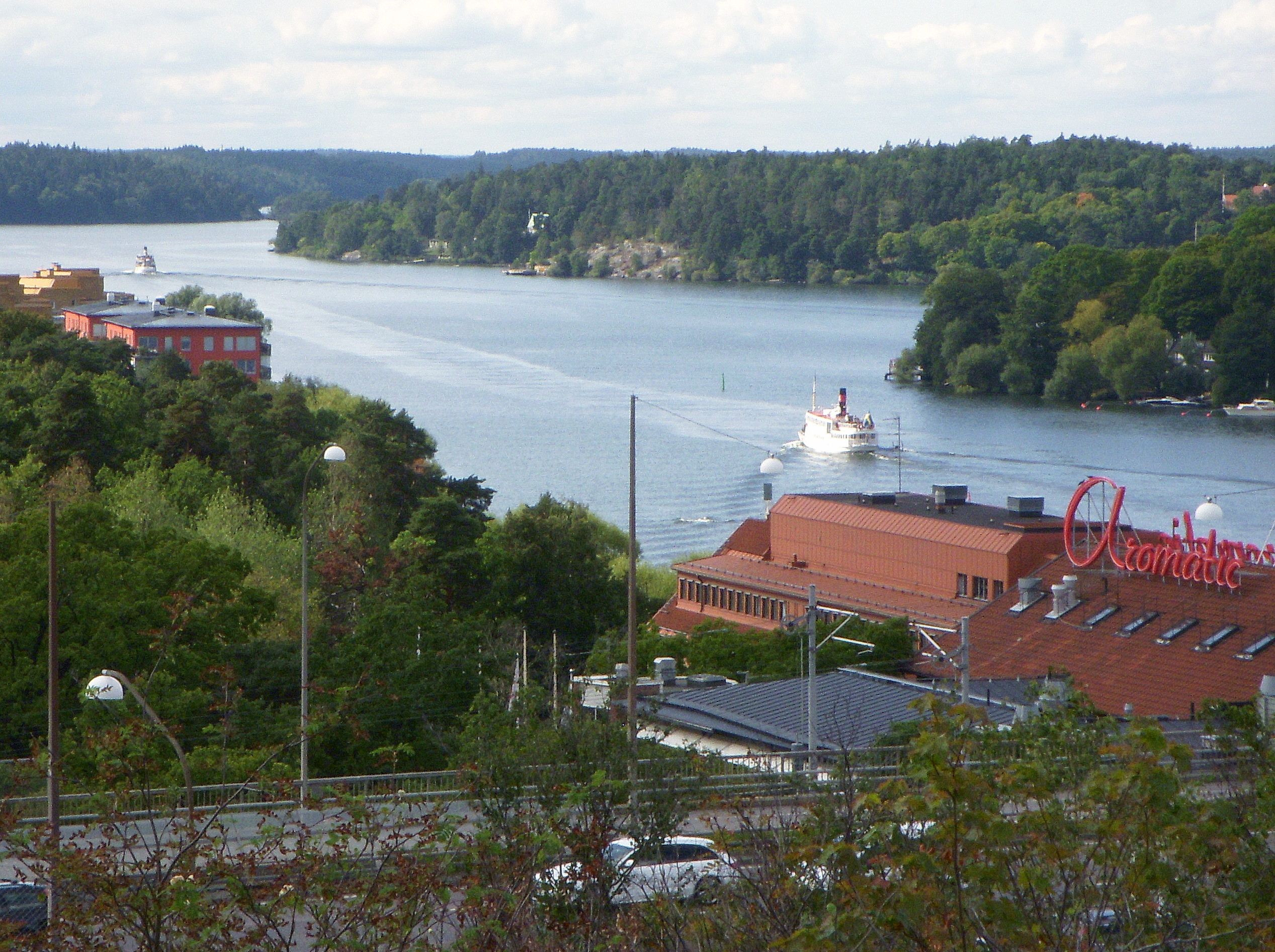 Essingesundet och Aromatics byggnad, vy mot väst